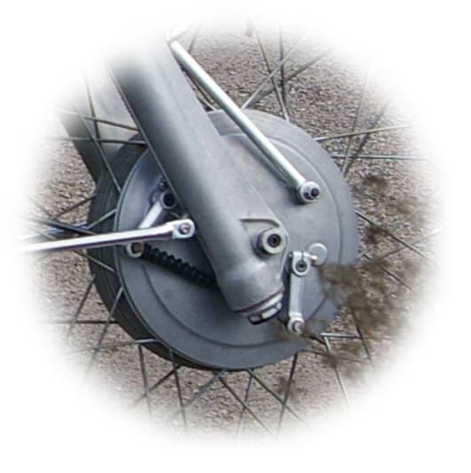 Duplexbremse einer BMW R 75/5, DO-Hohensyburg